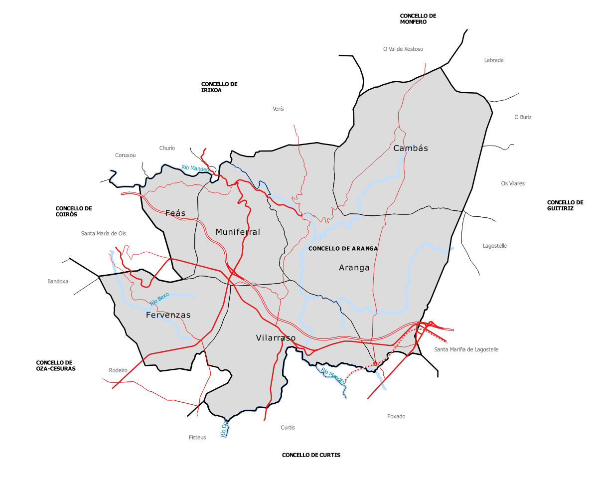 Mapa de parroquias do concello de Aranga (Galiza).